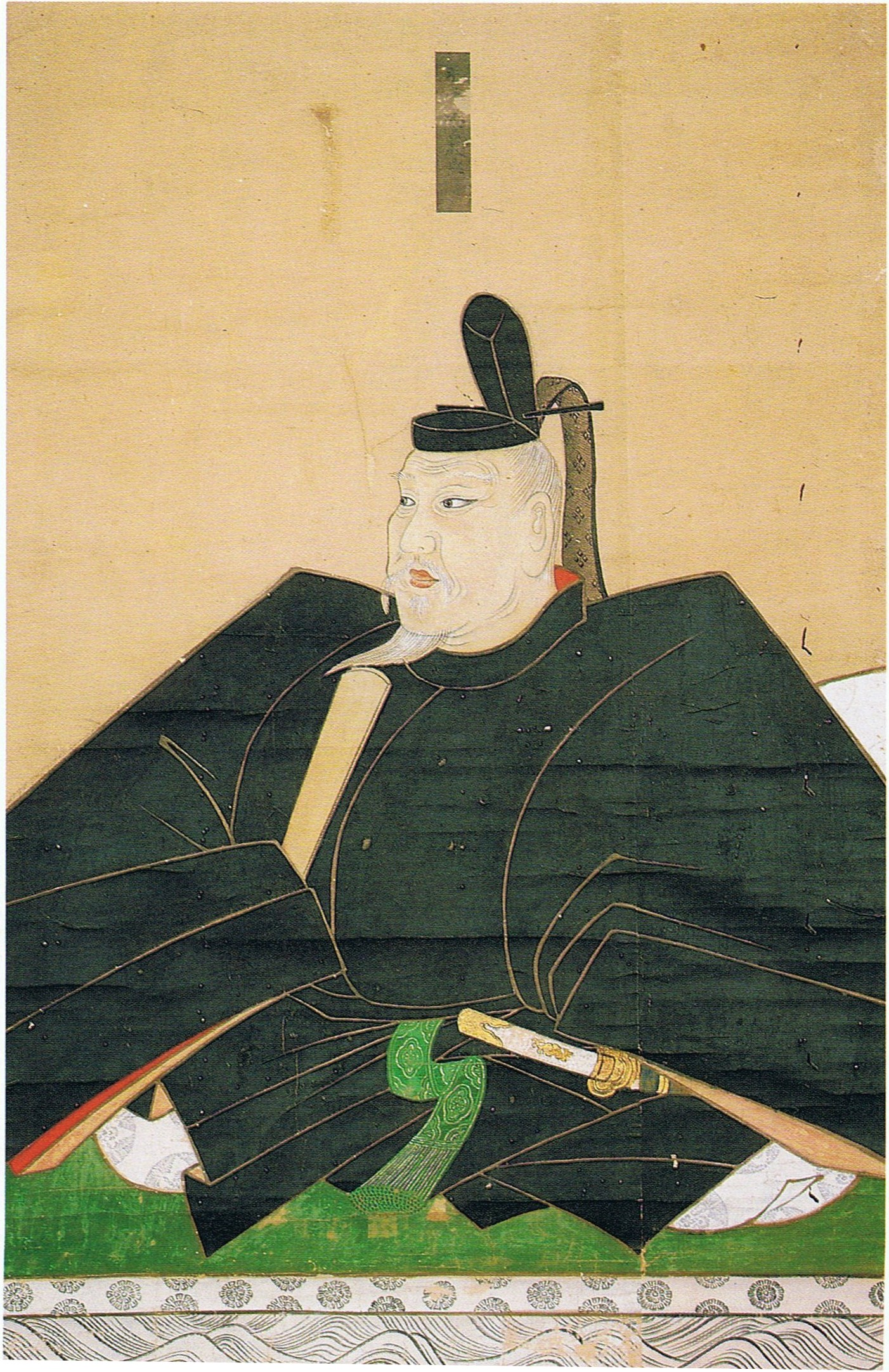 平教盛像